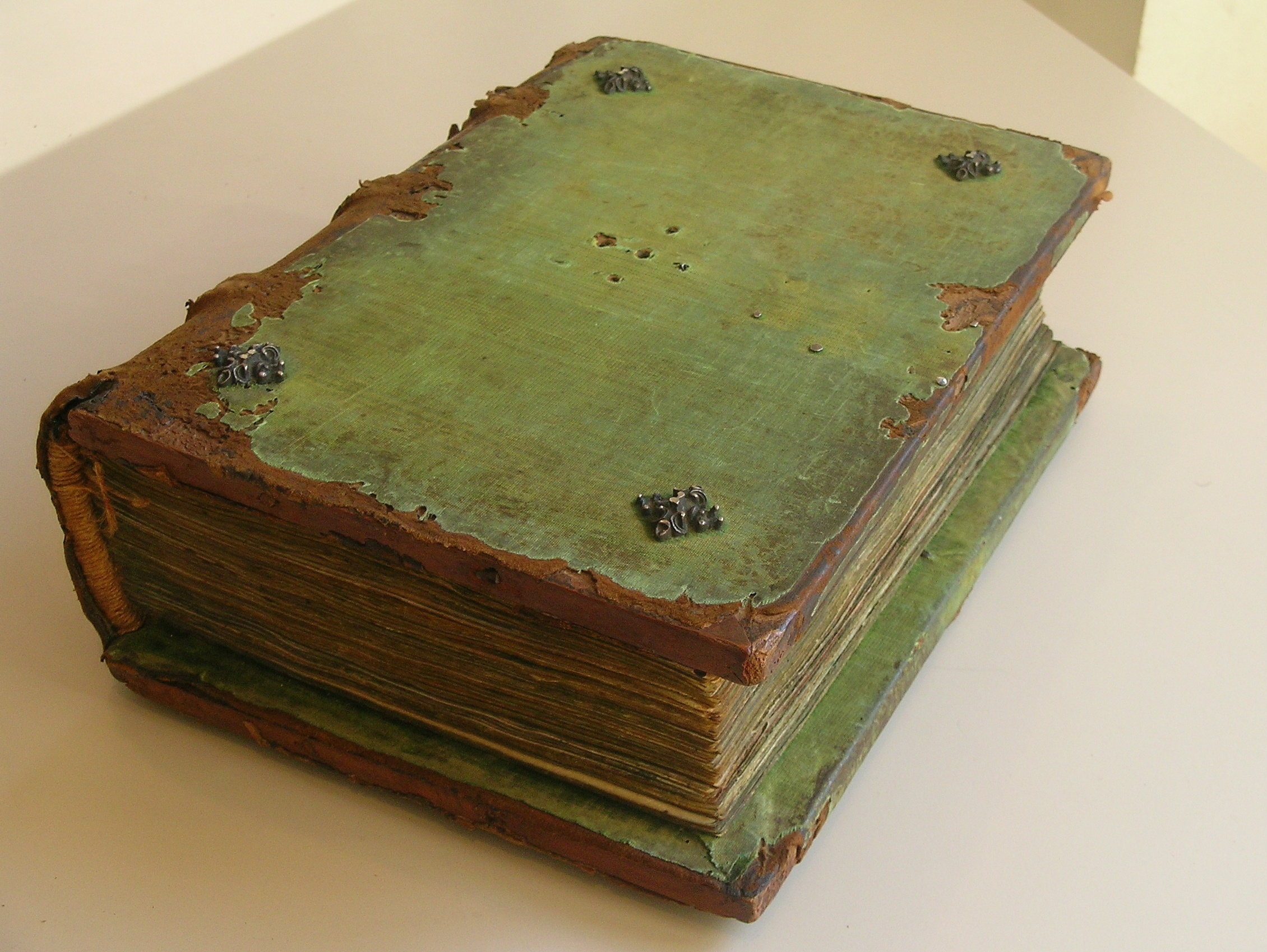 Dades tècniques Títol: Llibre Verd Data: Dates de creació: 1217-1902 / Dates d’agregació: 1358-1902 Suport material: pergamí. Cobertes de fusta folrades amb vellut. Mides: Fulls de pergamí: 307 x 225 mm; Cobertes de fusta: 340 x 230 mm Localització: Fons Ajuntament de Manresa.